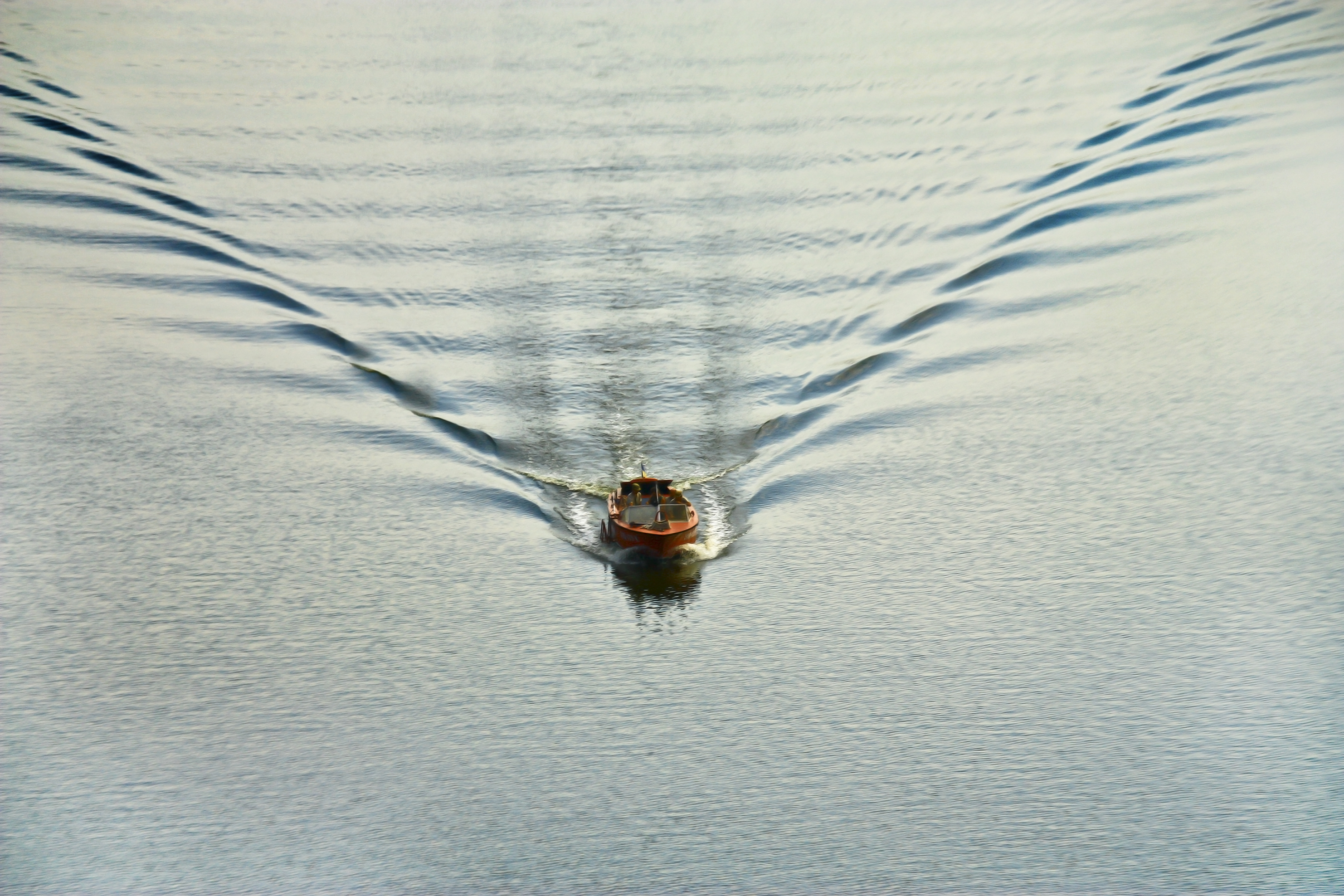 Національний заповідник „Хортиця”, Запоріжжя, острів Хортиця